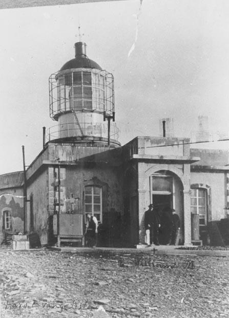 Faro Evangelistas a principios del siglo XX